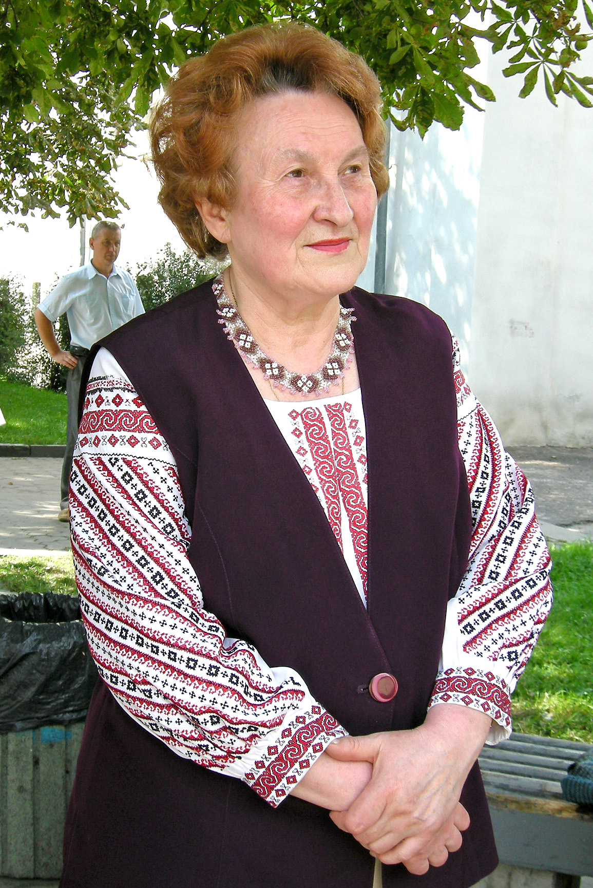 Українська громадська діячка, просвітянка, лікарка-терапевтка, літераторка Дарія Чубата.